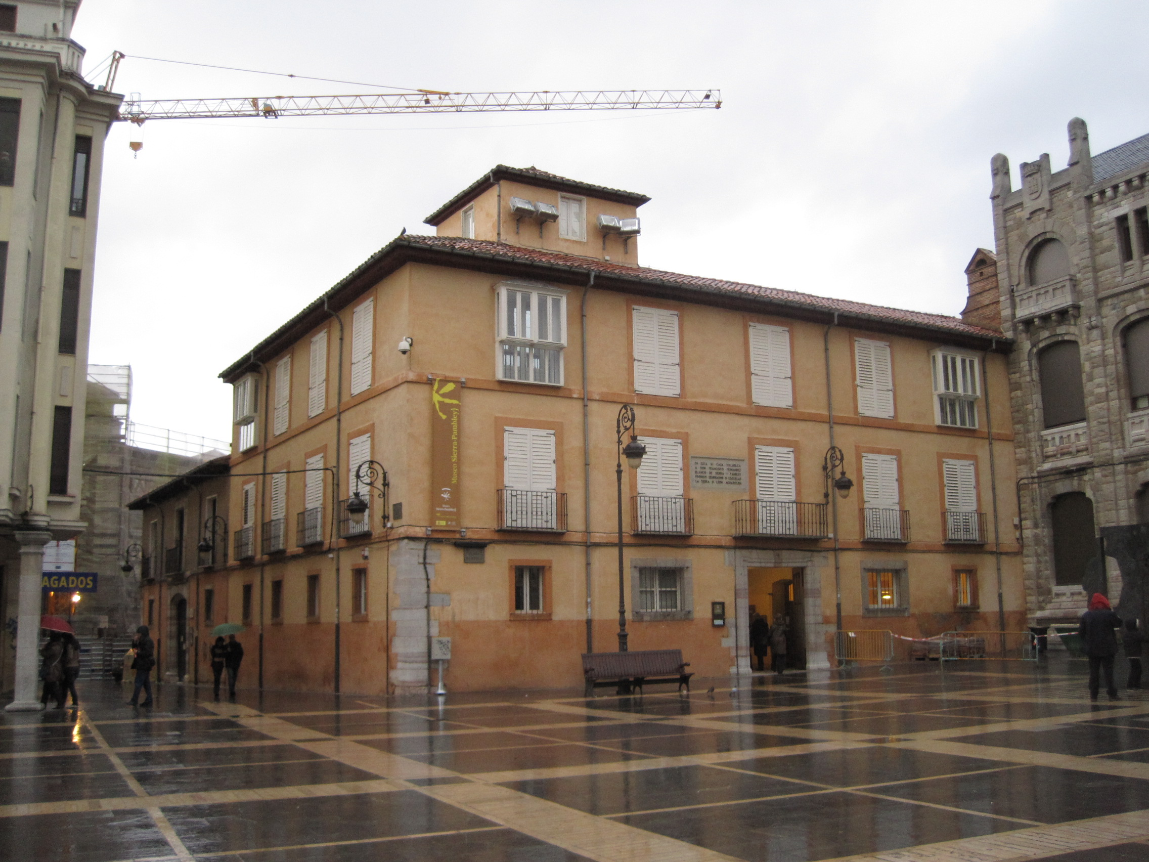 Edificio que alberga el museo Sierra-Pambley en León (España).